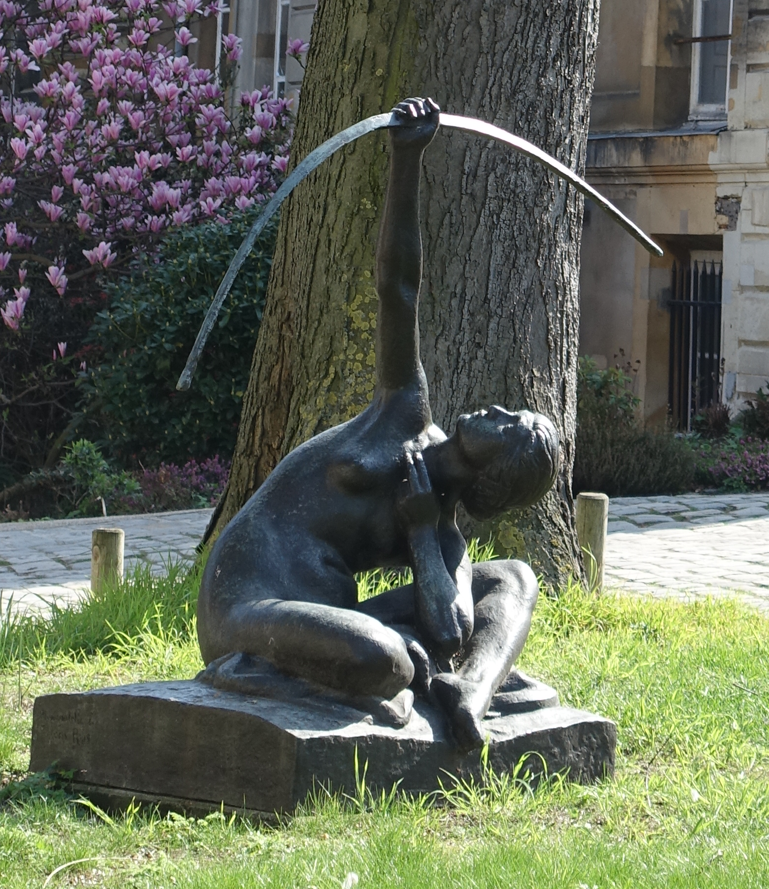 Jardin des Plantes @ Paris ; Femme archer, bronze par Pierre Vigoureux